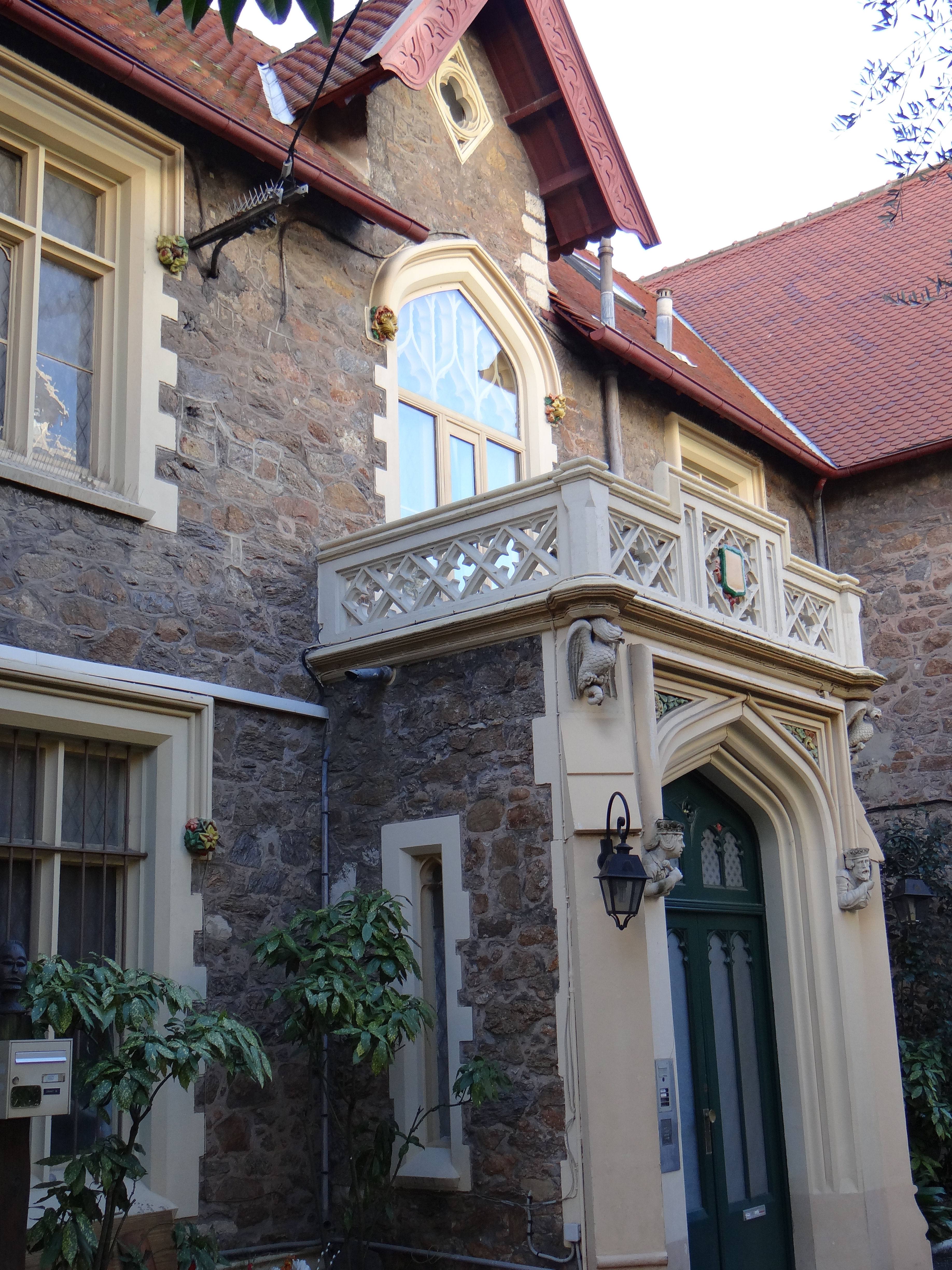 Cannes - Villa Victoria - Entrée